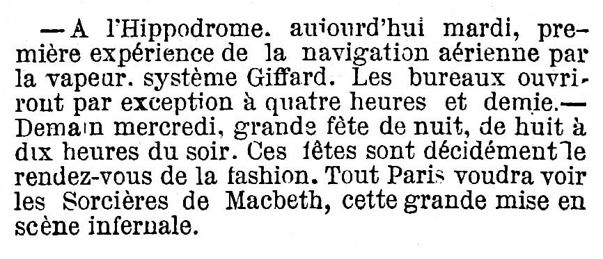 Annonce d'une expérience de Giffard à l'Hippodrome et information sur un spectacle dans le même lieu.